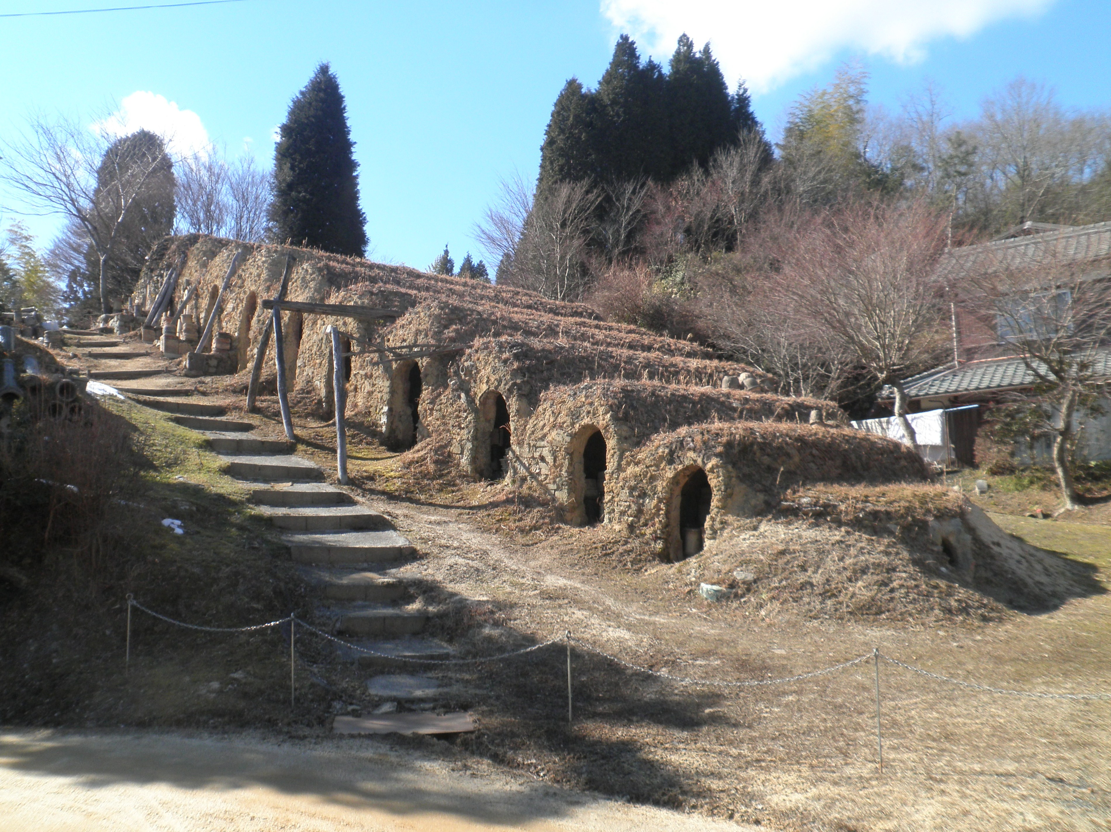 滋賀県甲賀市信楽町の登り窯、丸又窯跡。経産省の近代化産業遺産「甲賀市の窯業（信楽焼）関連遺産」、滋賀県史跡「信楽焼窯跡群」